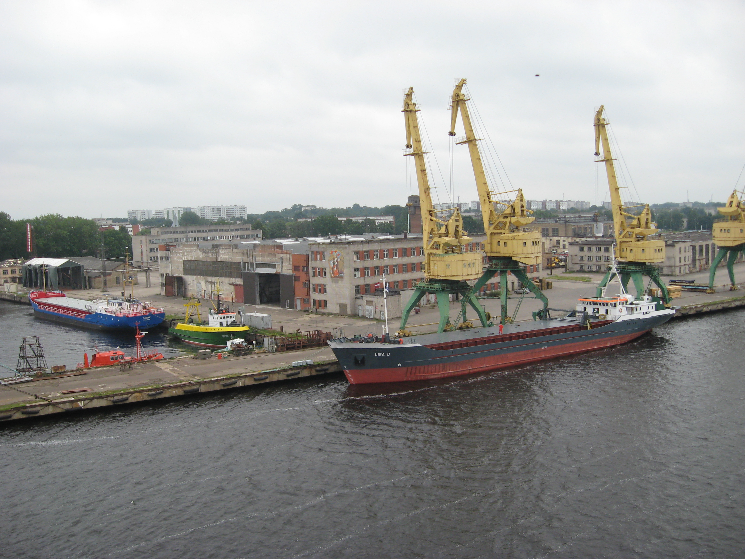 Riga port